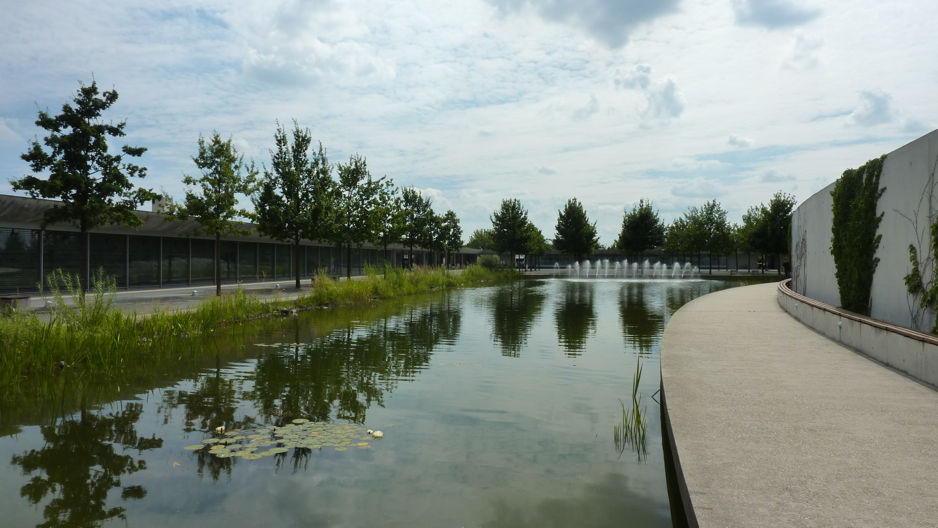 Tierheim Berlin, Innenbereich, Blickrichtung Süden.